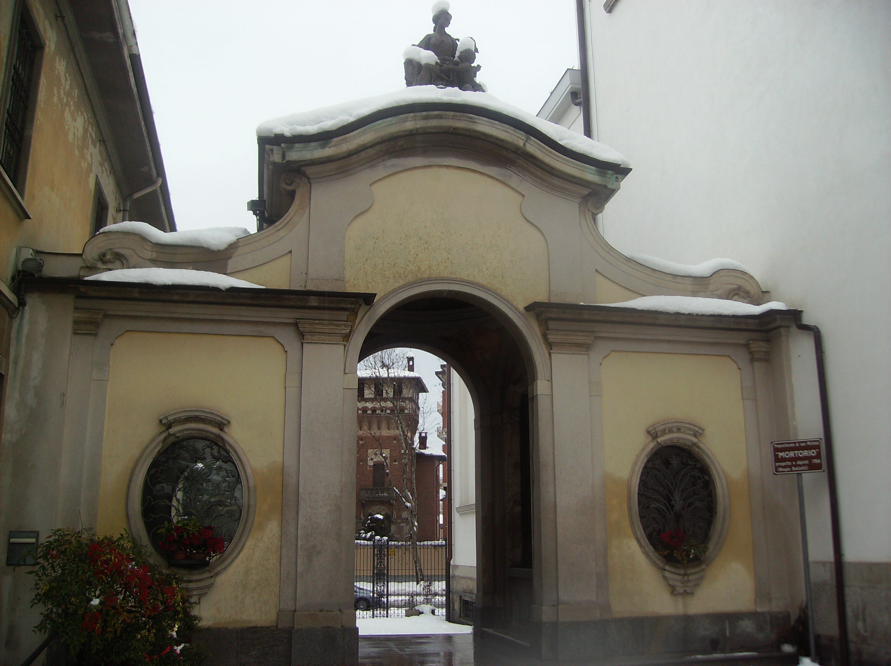 Mortorio della chiesa di San Michele Arcangelo (Busto Arsizio)